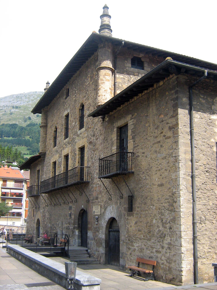 Casa-Torre Enparan, en el municipio de Azpeitia (Guipúzcoa / Gipuzkoa). Se trata de una de las edificaciones más destacadas de la localidad.